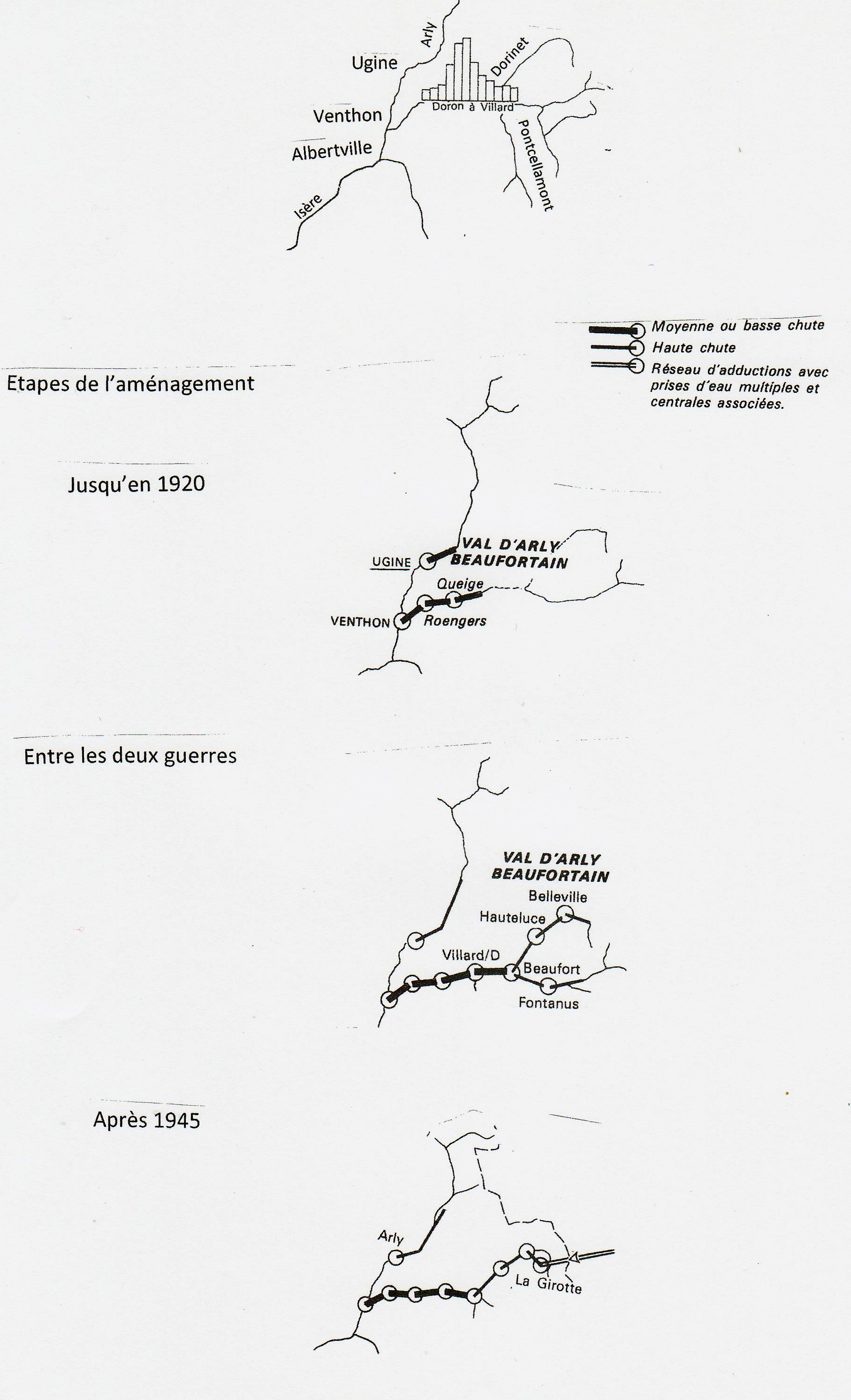 Etapes de l'aménagement hydroélectrique du Beaufortain